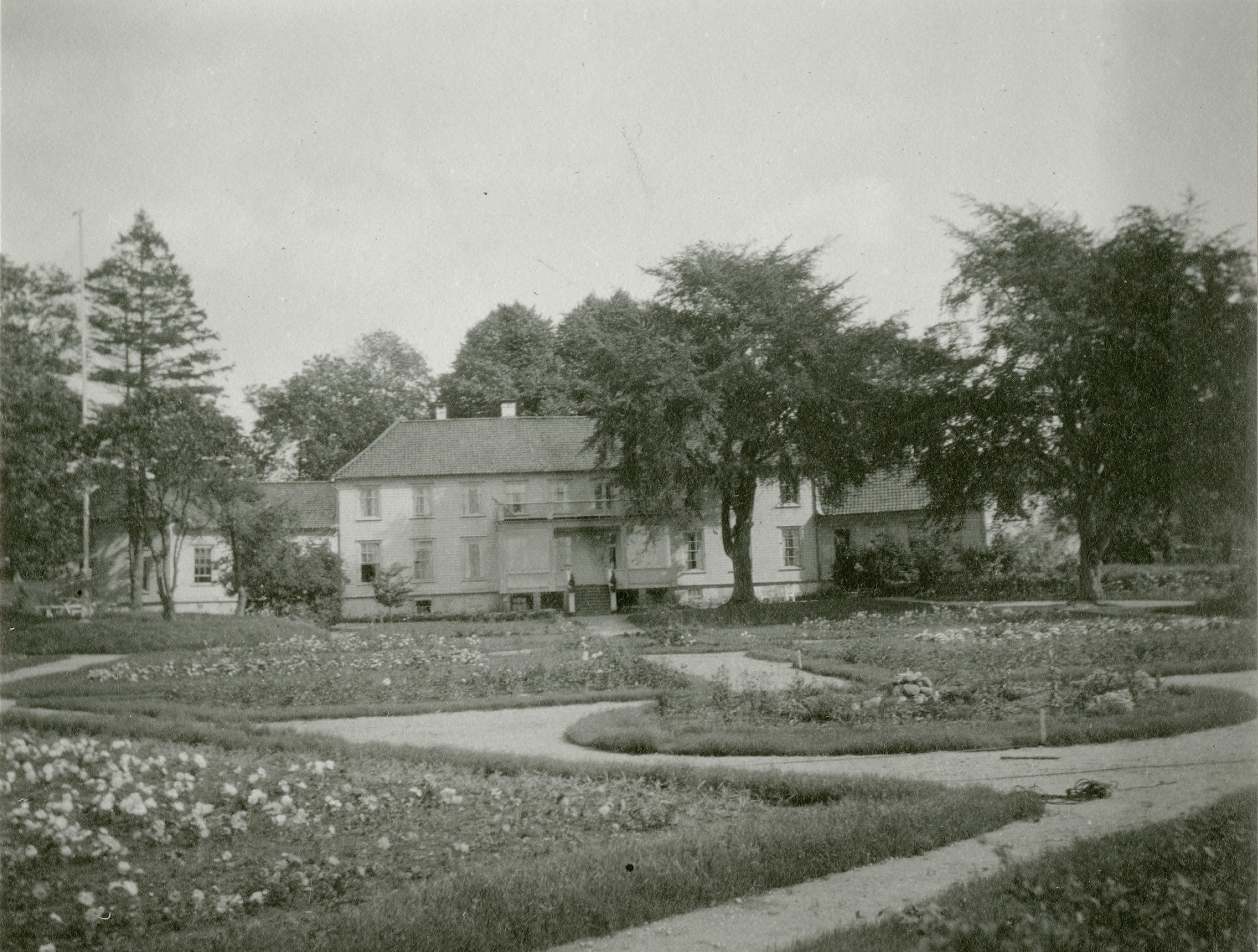 Kongsgård Øvre, Oddernes i Oddernes, Vest-Agder This image on crowdsourcing geotagging platform Fotodugnad